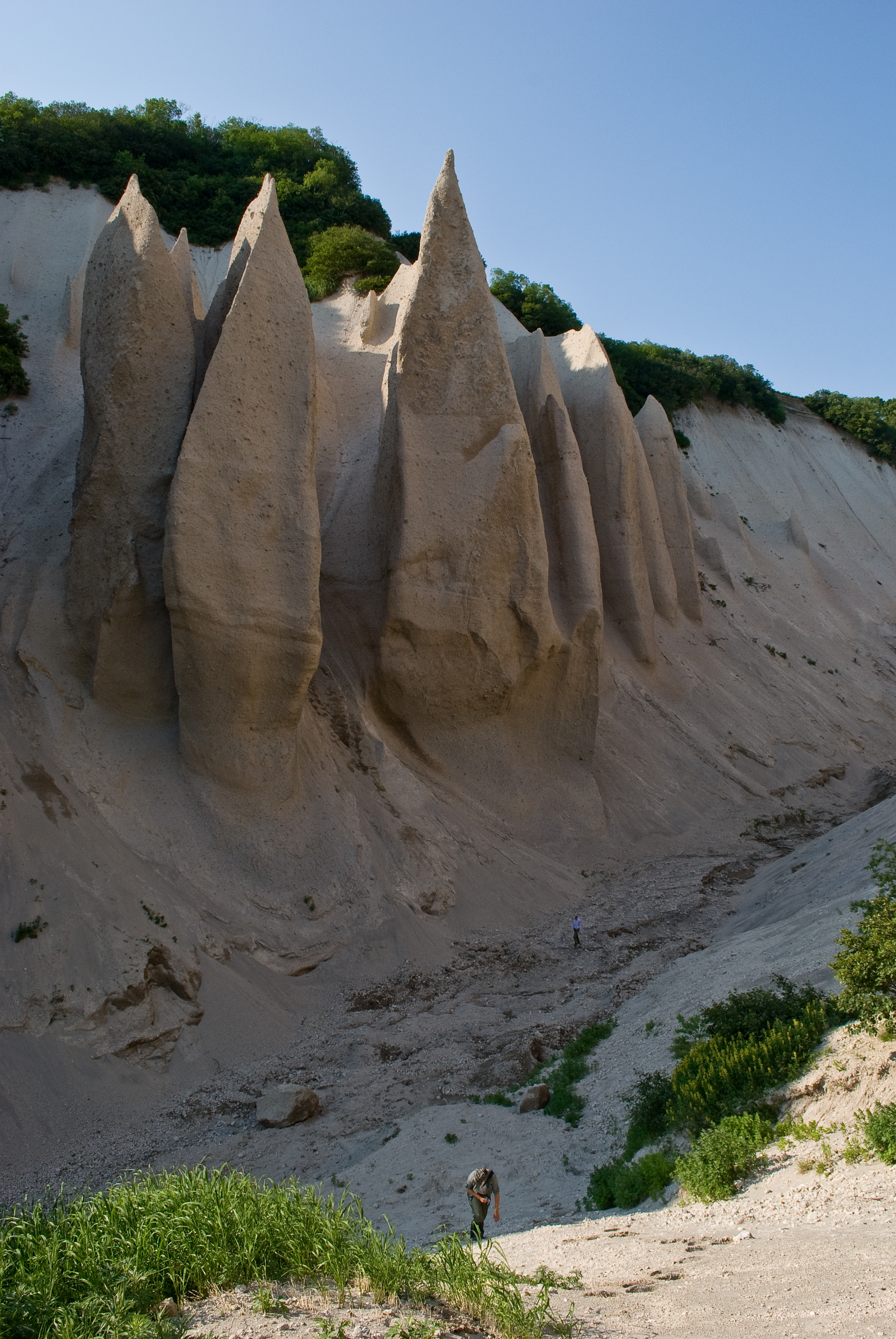 Урочище «Кутхины баты», Усть-Большерецкий район This image is related to the protected area of Russia number 4110065